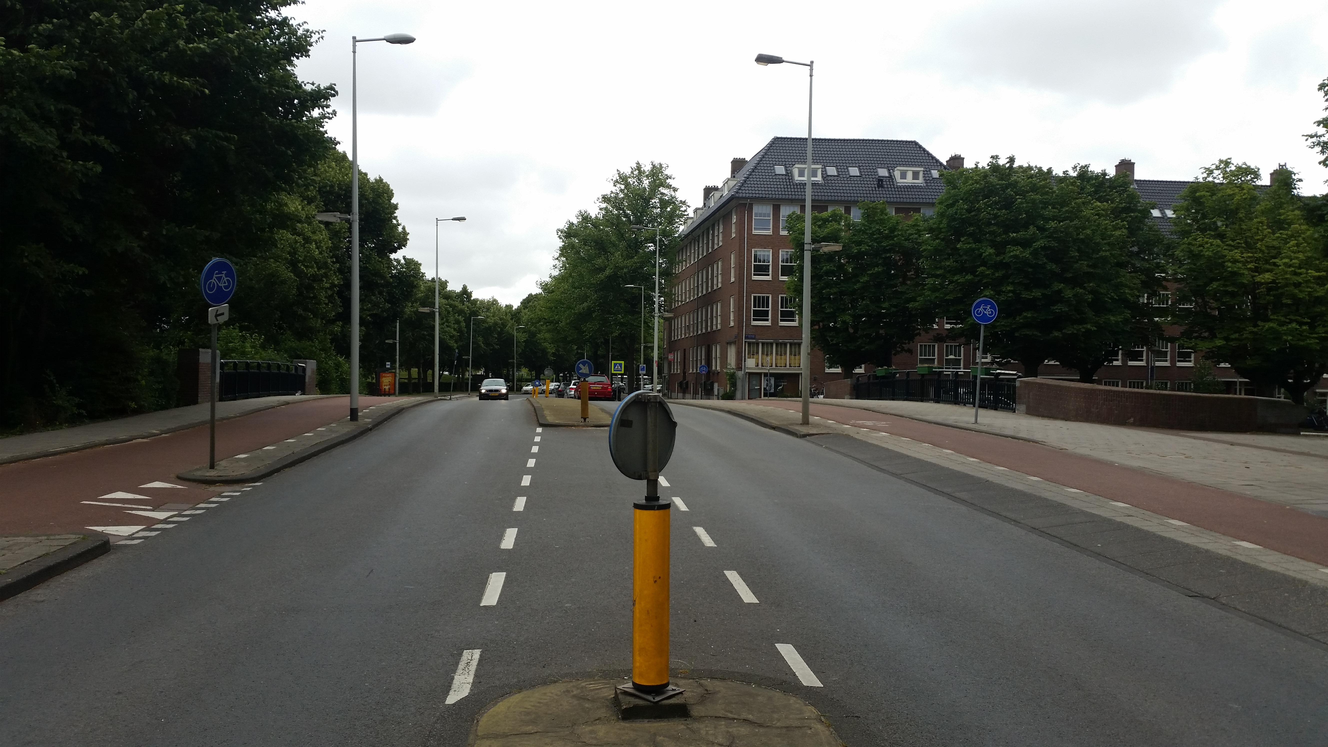 Brug 383, Anna van Saksenbrug, overzichtsfoto